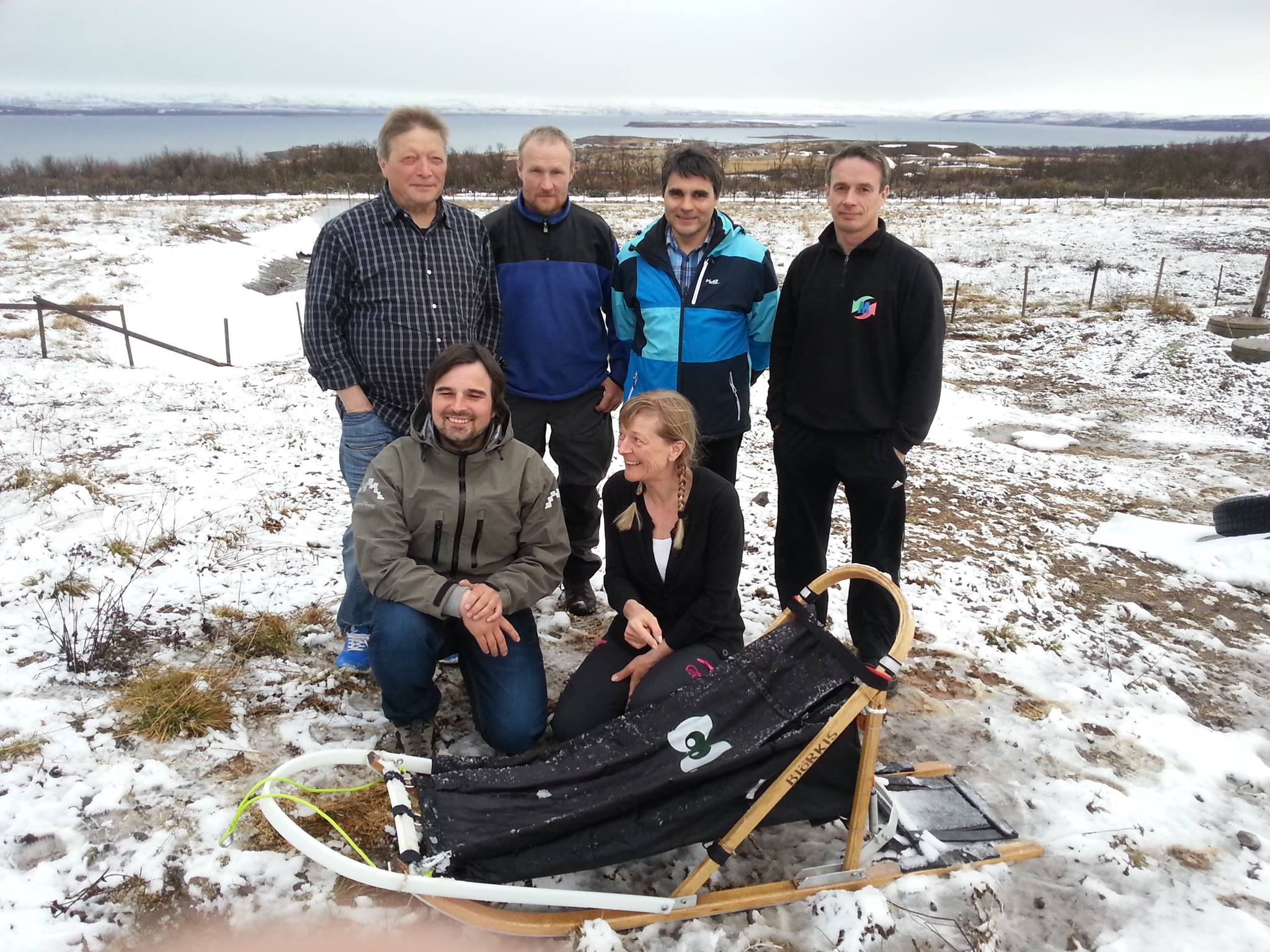 Krisekomiteen legger nye og større planer for Bergebyløpet Bildet er tatt 21.mai 2014